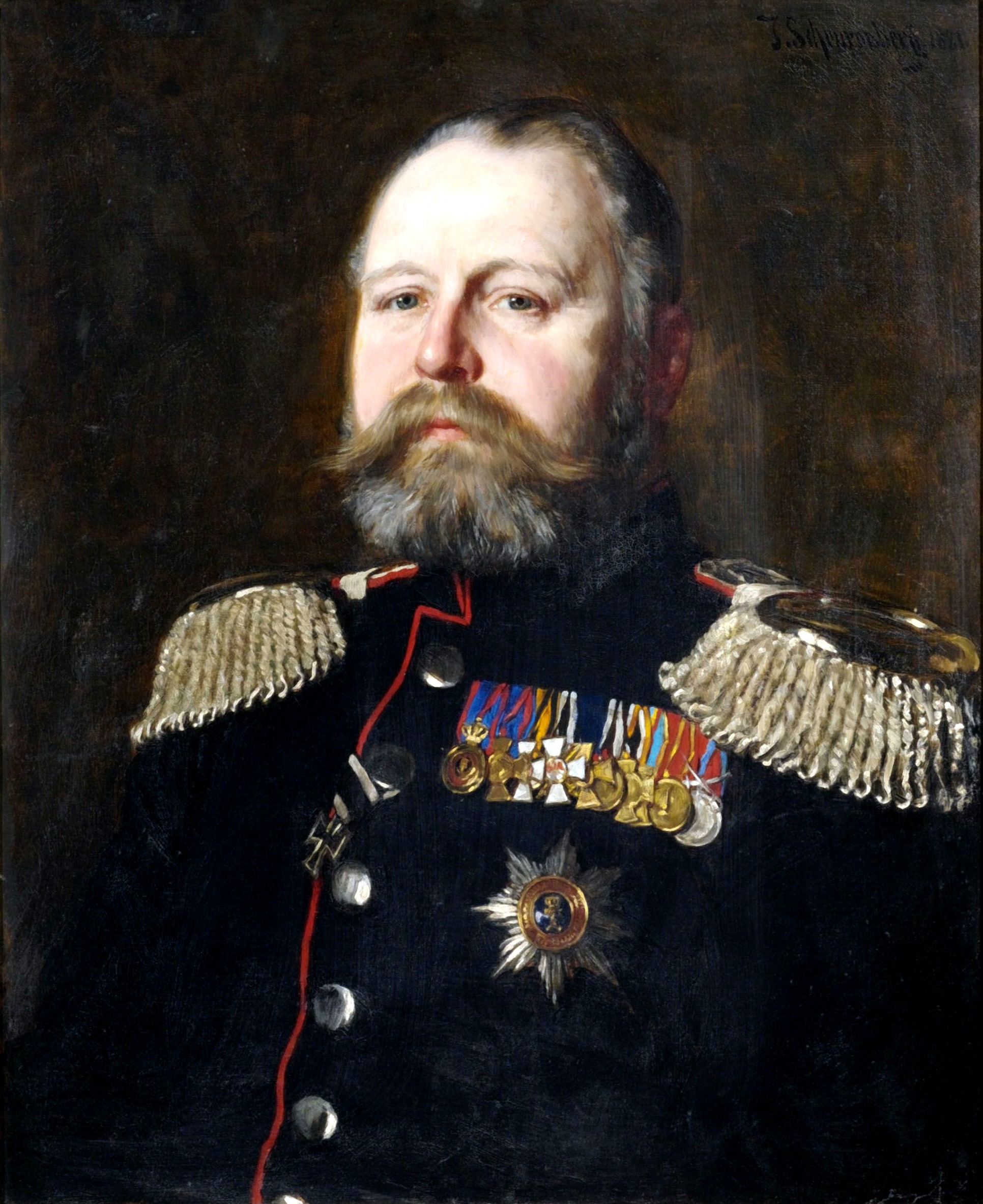 Portrait des Prinzen Friedrich Wilhelm Nikolaus Albrecht von Preußen (1837-1906), Öl auf Leinwand, oben rechts signiert und datiert 1881.